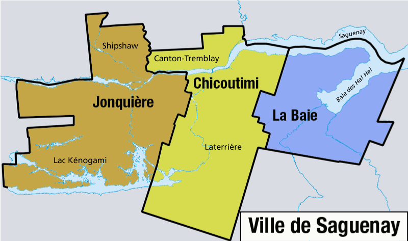 Arrondissements de la Ville de Saguenay, Québec, Canada